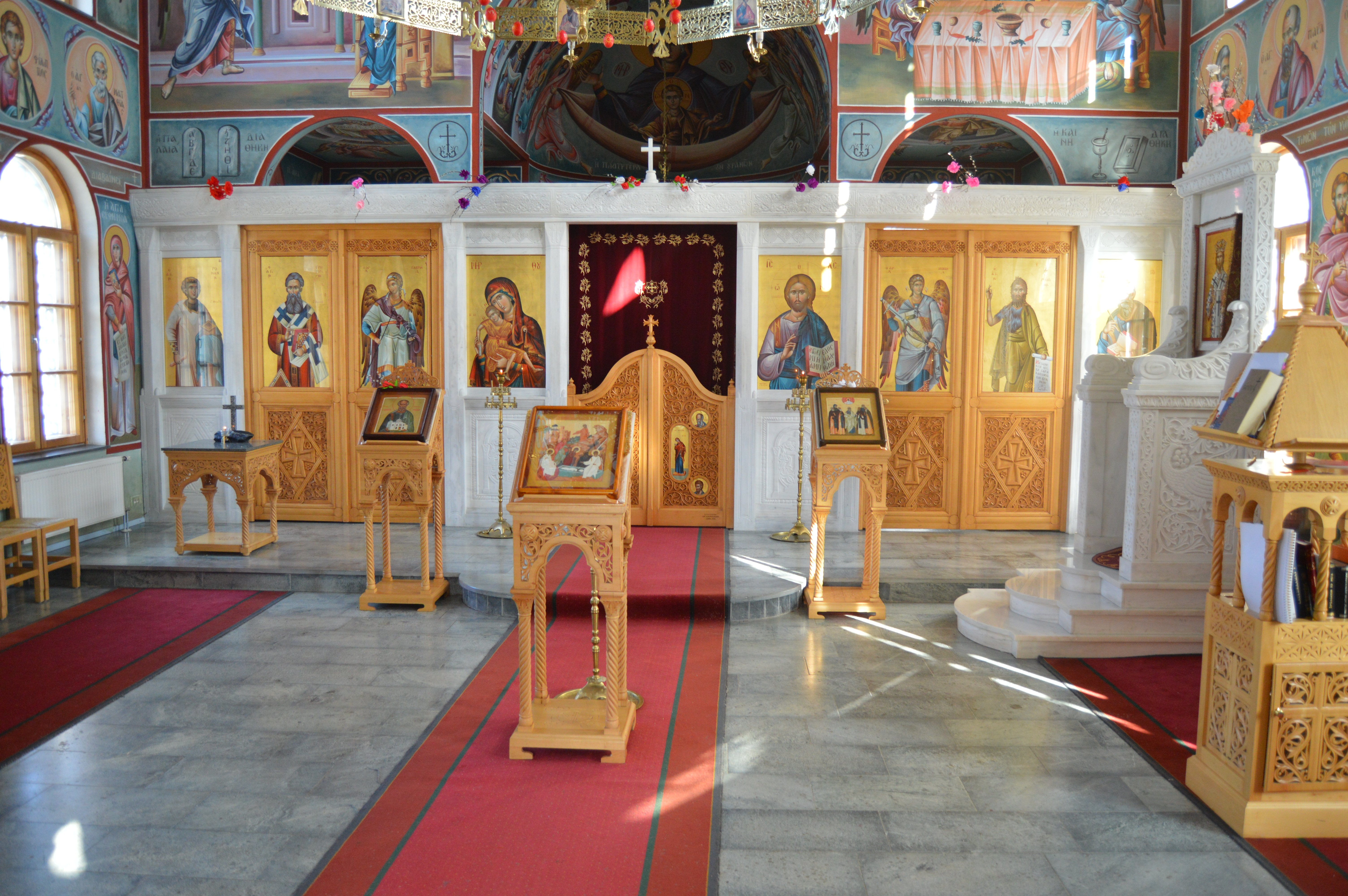 Joensuun ortodoksisen seminaarin kirkko